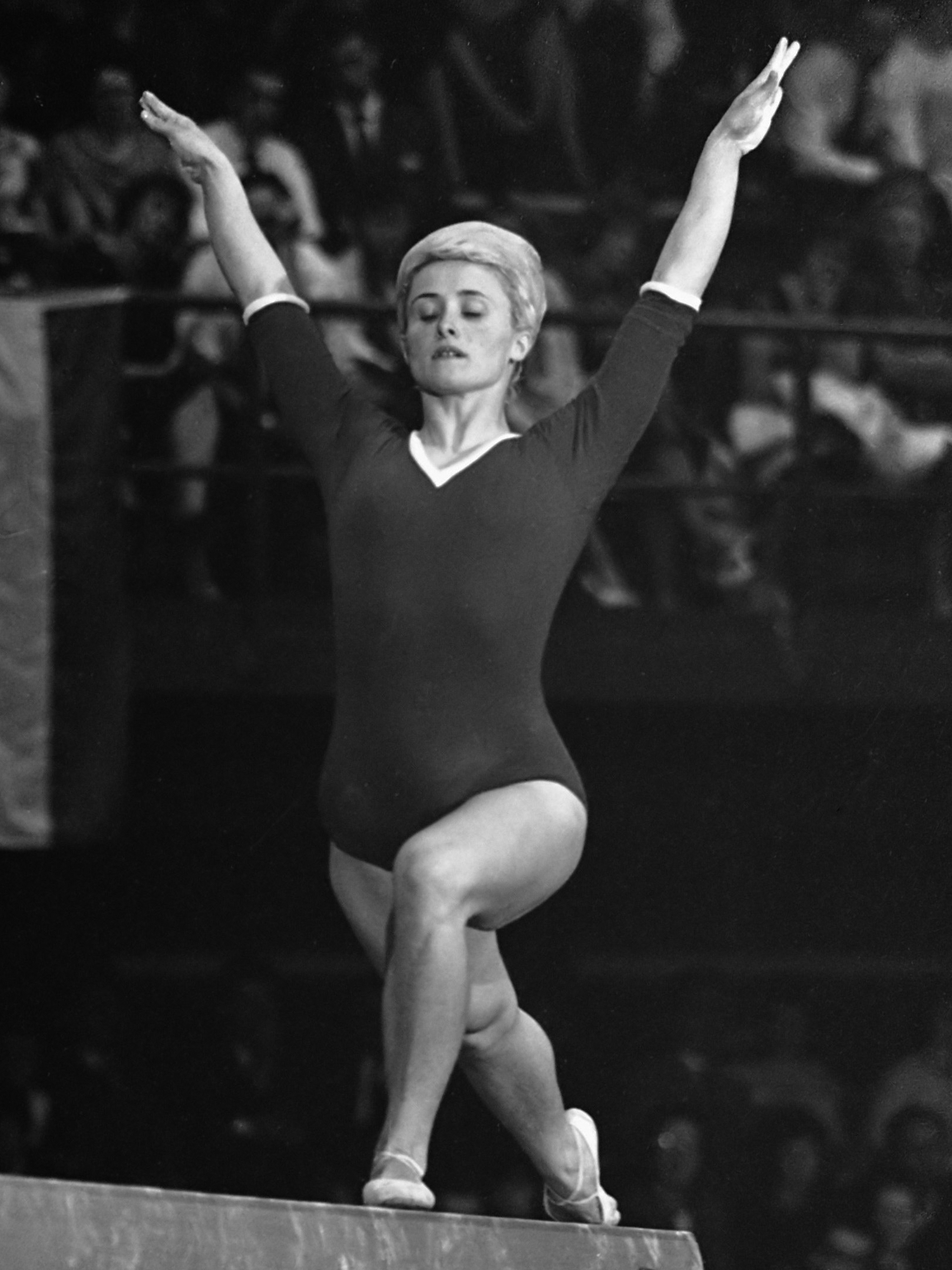 Turnen Nederland tegen Polen, Barbara Eustachiewicz op de evenwichtsbalk het hoogste aantal punten 26 mei 1963